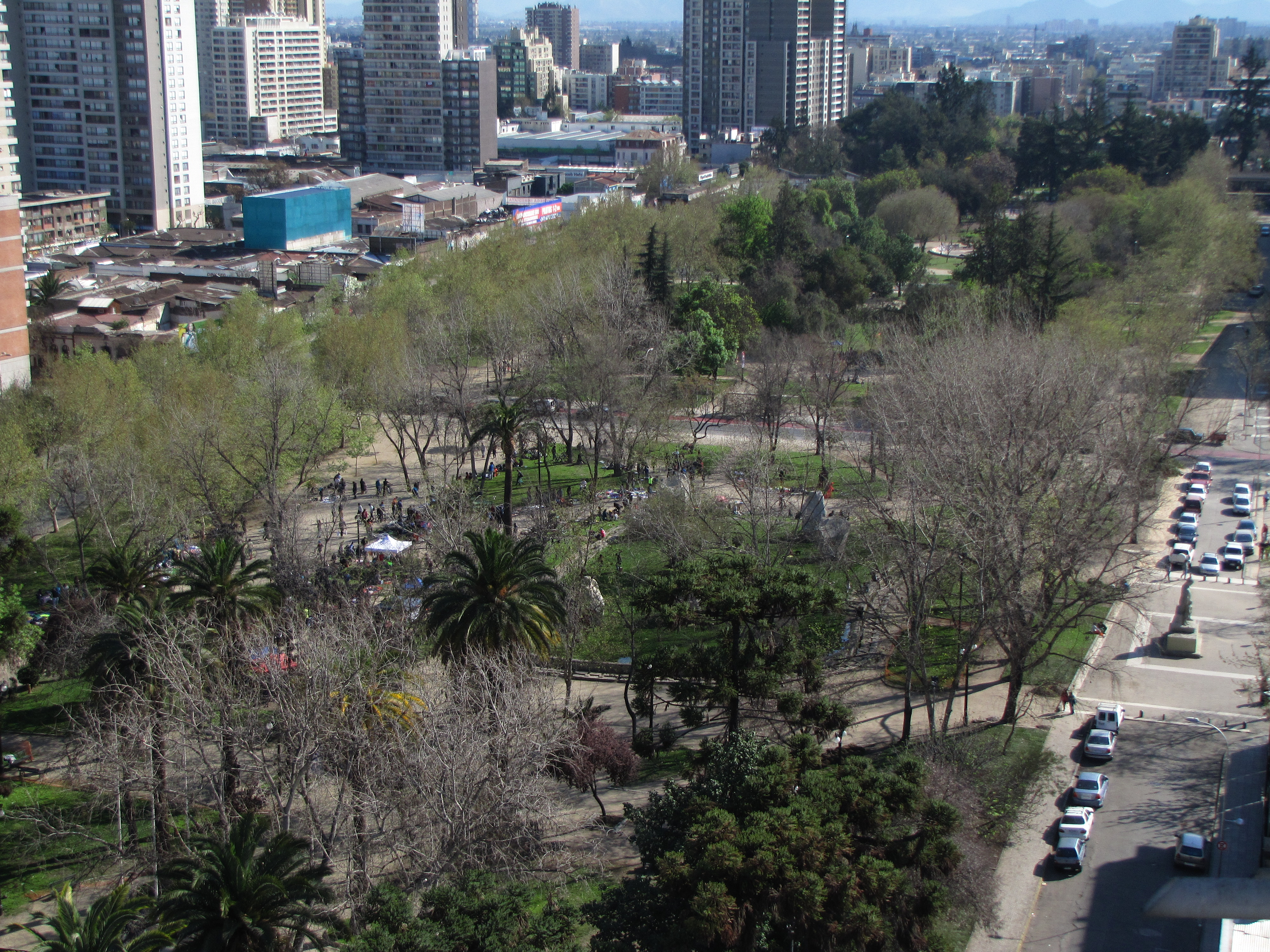 Barrio Cívico, Eje Bulnes y Parque Almagro This is a photo of a national monument in Chile: 2017